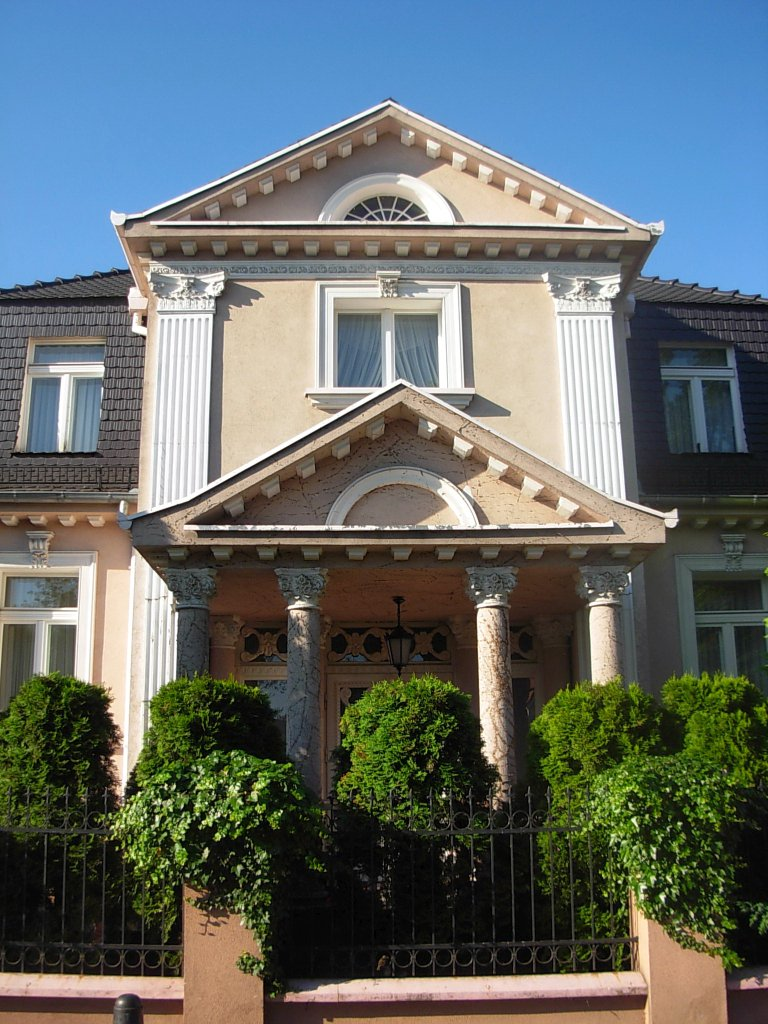 Osiedle Sielanka w Bydgoszczy, dom ul. Wyspiańskiego 8 (1914-1917)